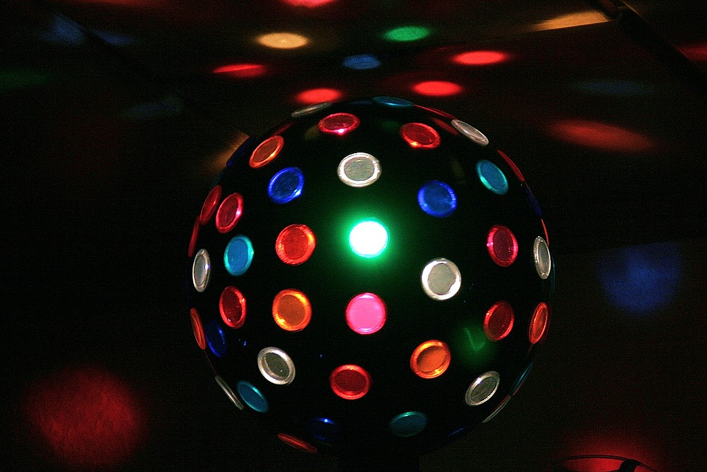 Discofeeling